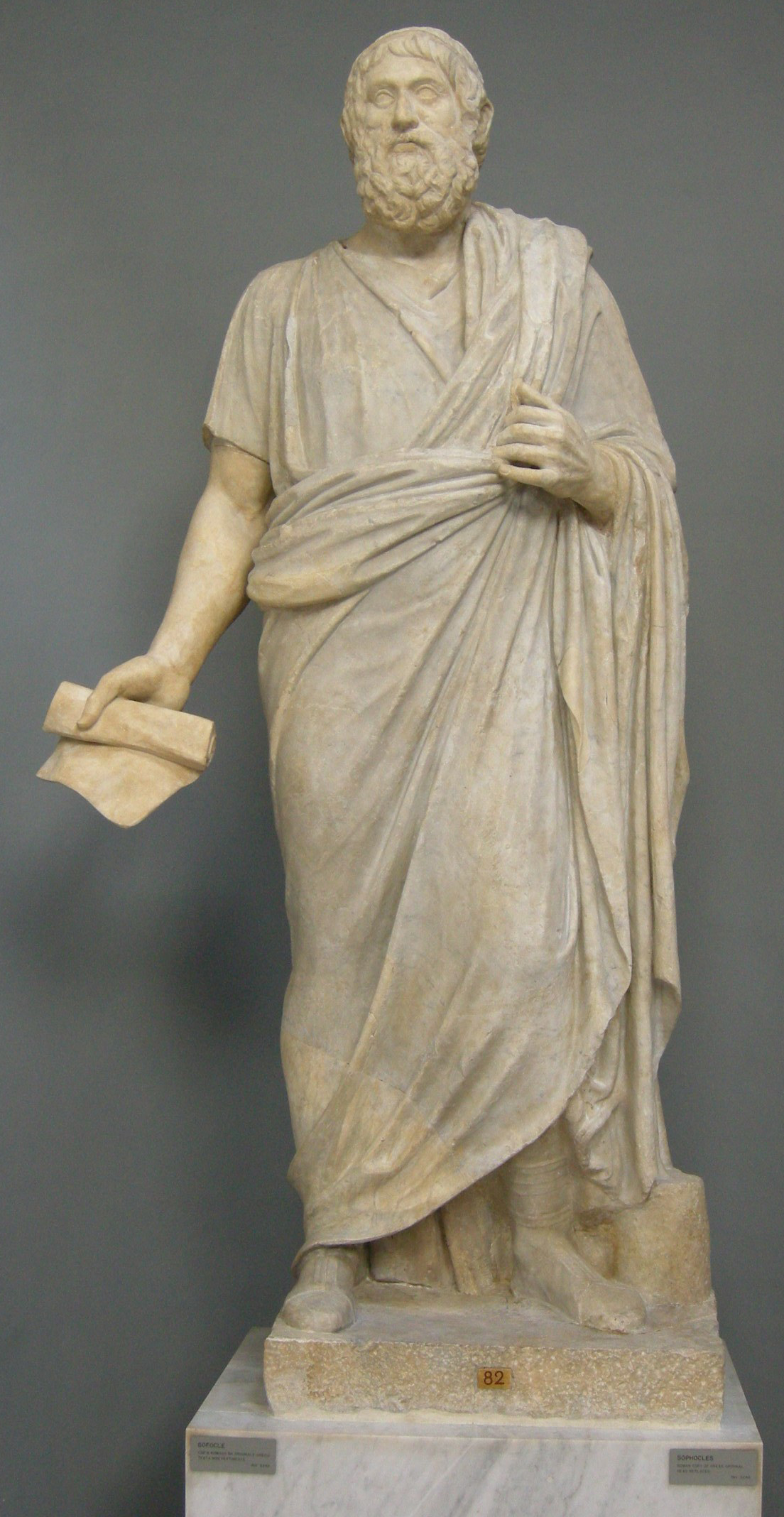 Sofocle, copia romana da originale greco con testa non pertinente, inv. 2242